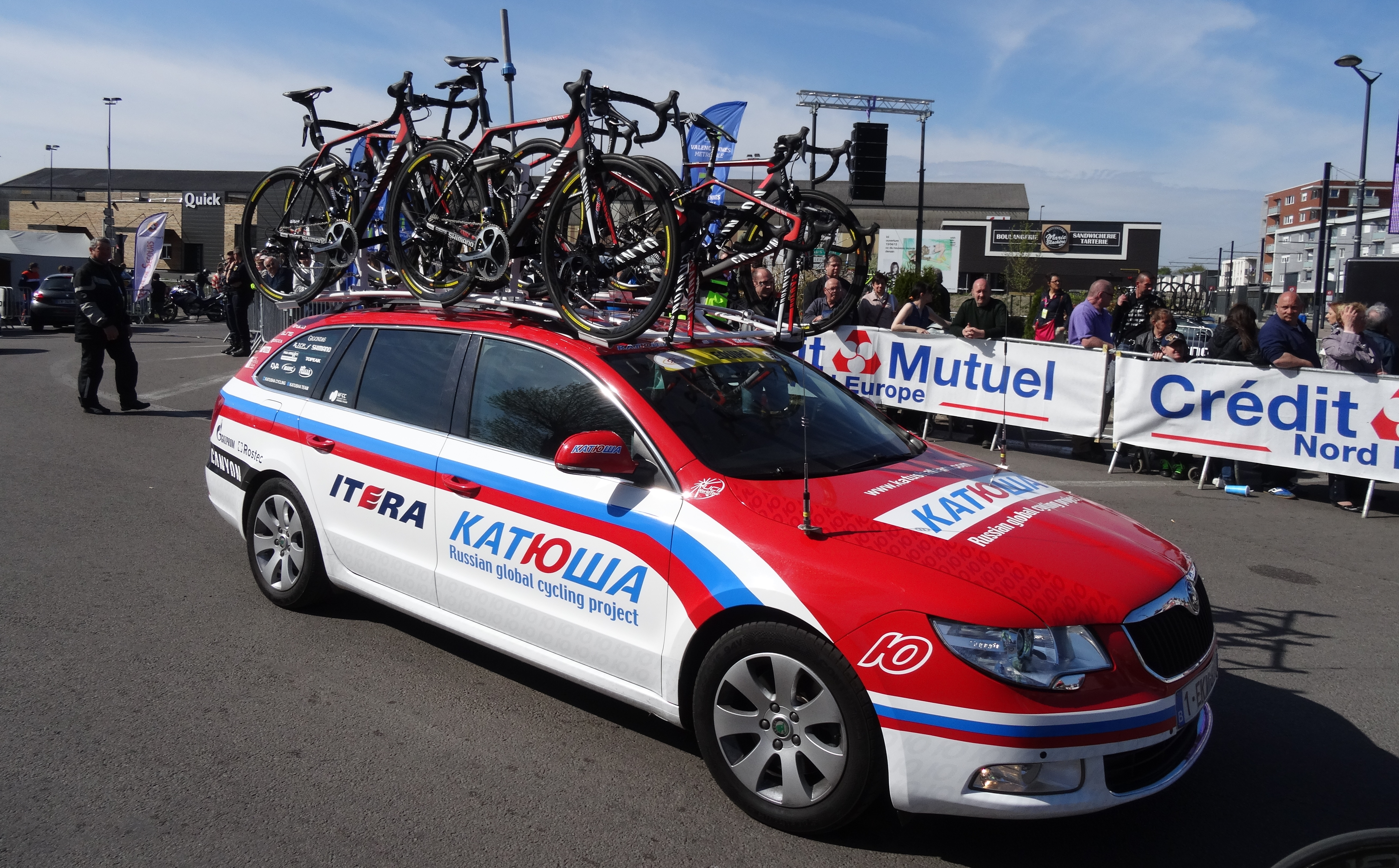 Reportage réalisé le jeudi 17 avril à l'occasion du départ et de l'arrivée du Grand Prix de Denain 2014 à Denain, Nord, Nord-Pas-de-Calais, France.